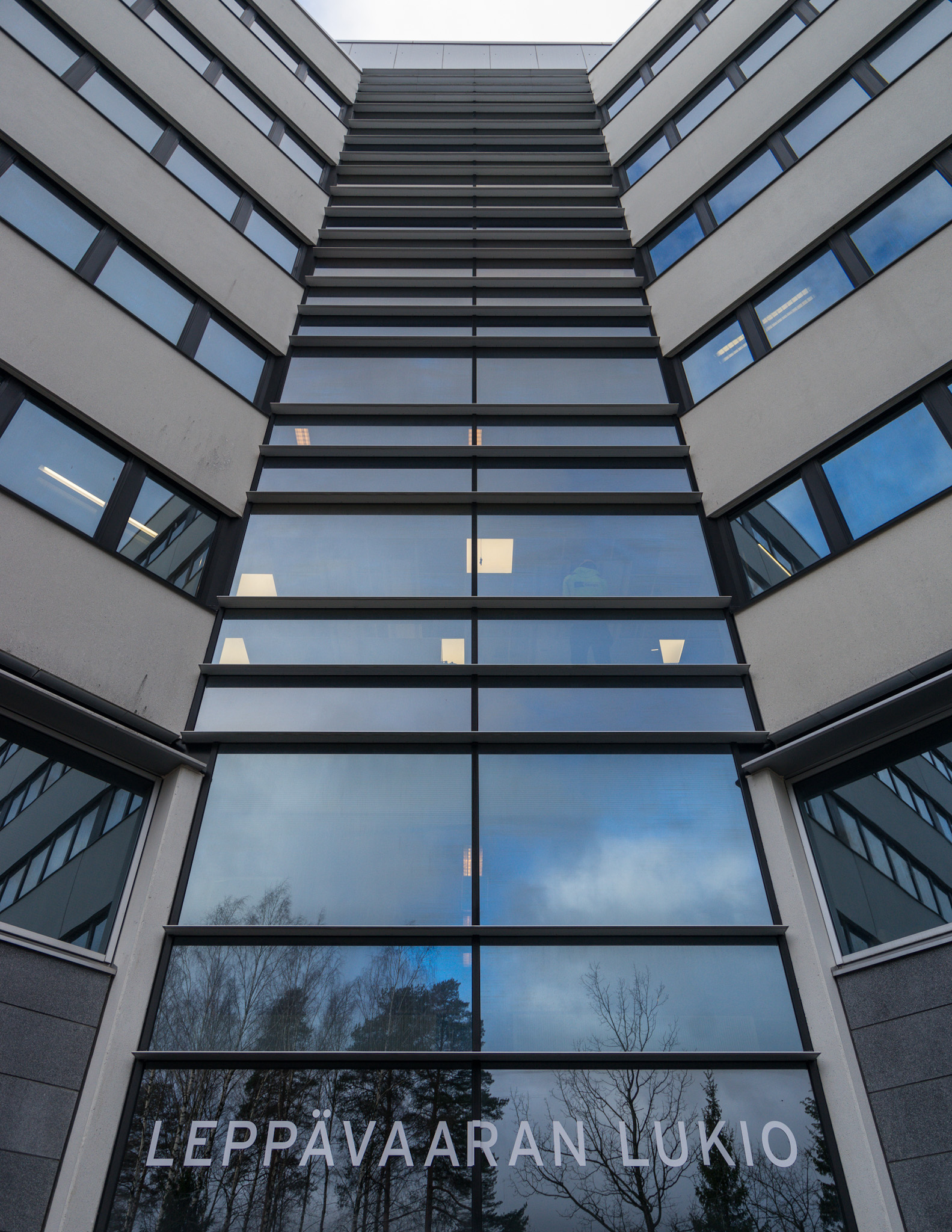 Kuva kiinteistöstä, jossa koulu tällä hetkellä sijaitsee.